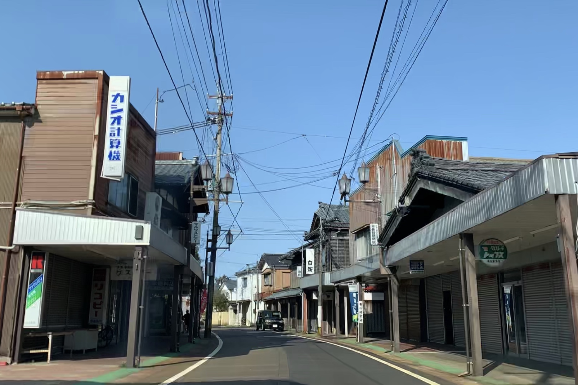 吉田の古くからの市街地（新潟県道223号石瀬吉田線沿い，2020年3月）